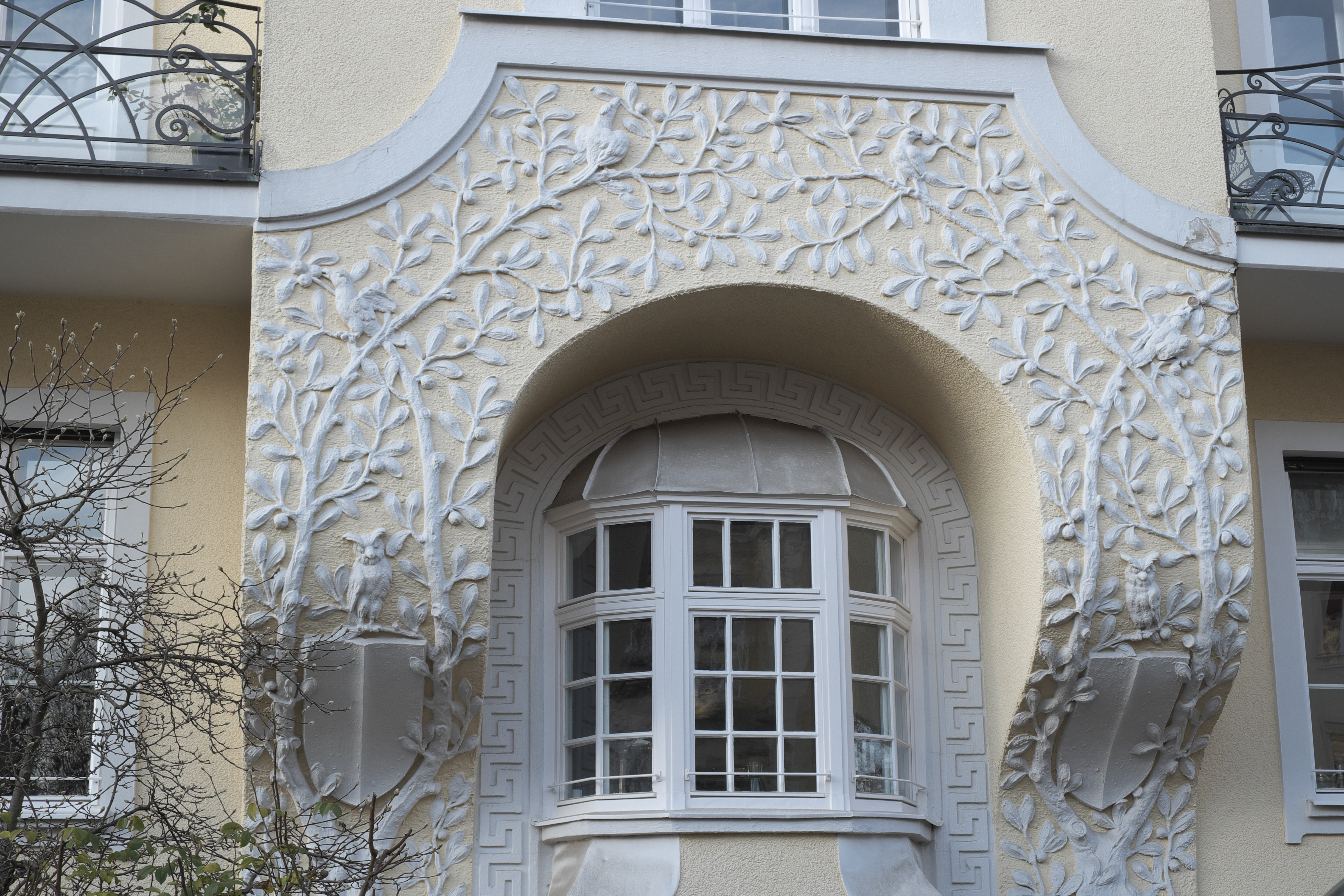 Jugendstilgebäude in der Bothmerstraße 7/9 in Neuhausen im Stadtbezirk Neuhausen-Nymphenburg in München (Bayern/Deutschland)